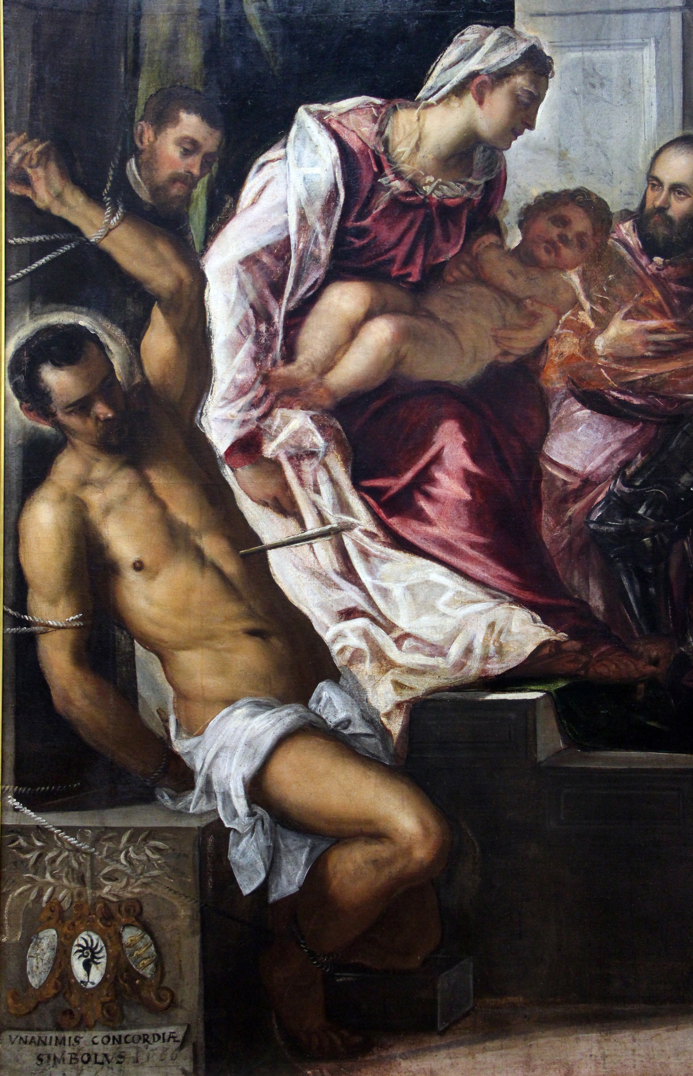 Gallerie dell'Accademia - MIBAC The making of this document was supported by Wikimedia CH. (Submit your project!) For all the files concerned, please see the category Supported by Wikimedia CH. This is a photo of a monument which is part of cultural heritage of Italy.